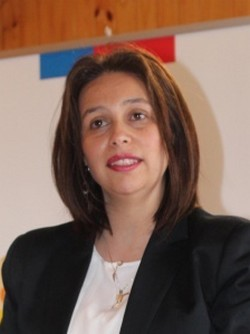 Ximena Loreto Órdenes Neira, socióloga y política chilena